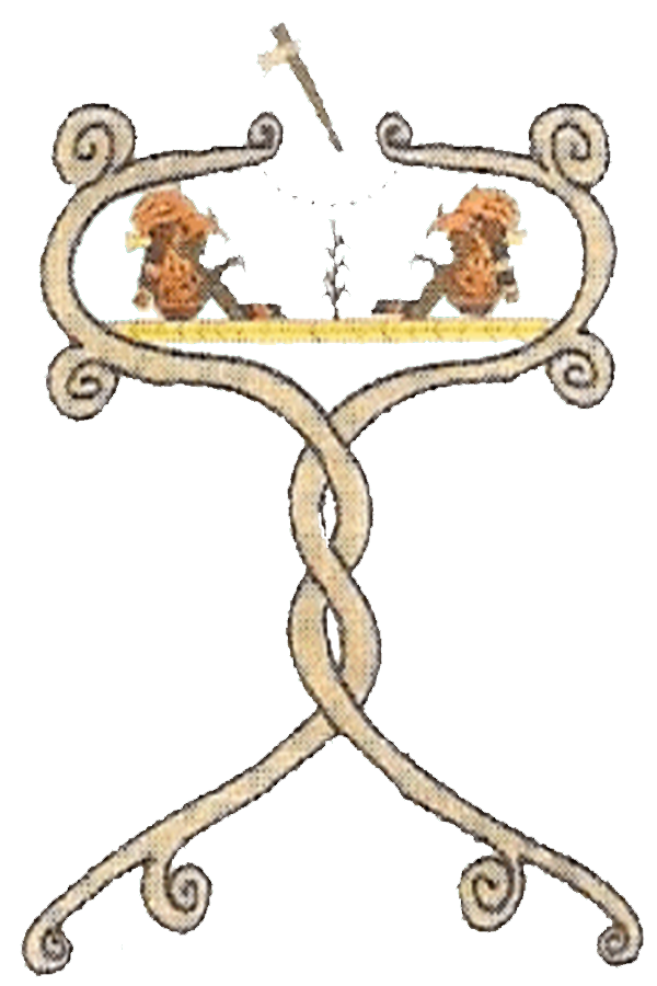 Escudo de Teposcolula